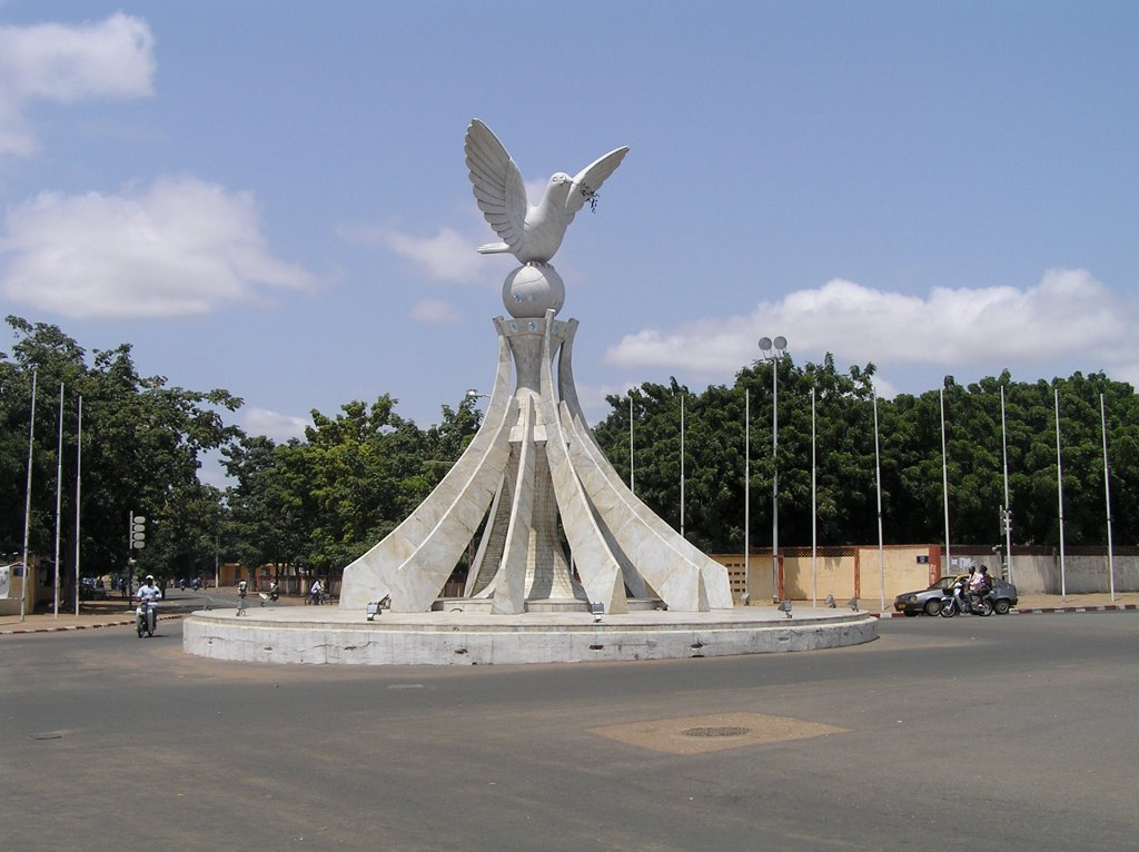 Peace dove statue in Lomé, Togo